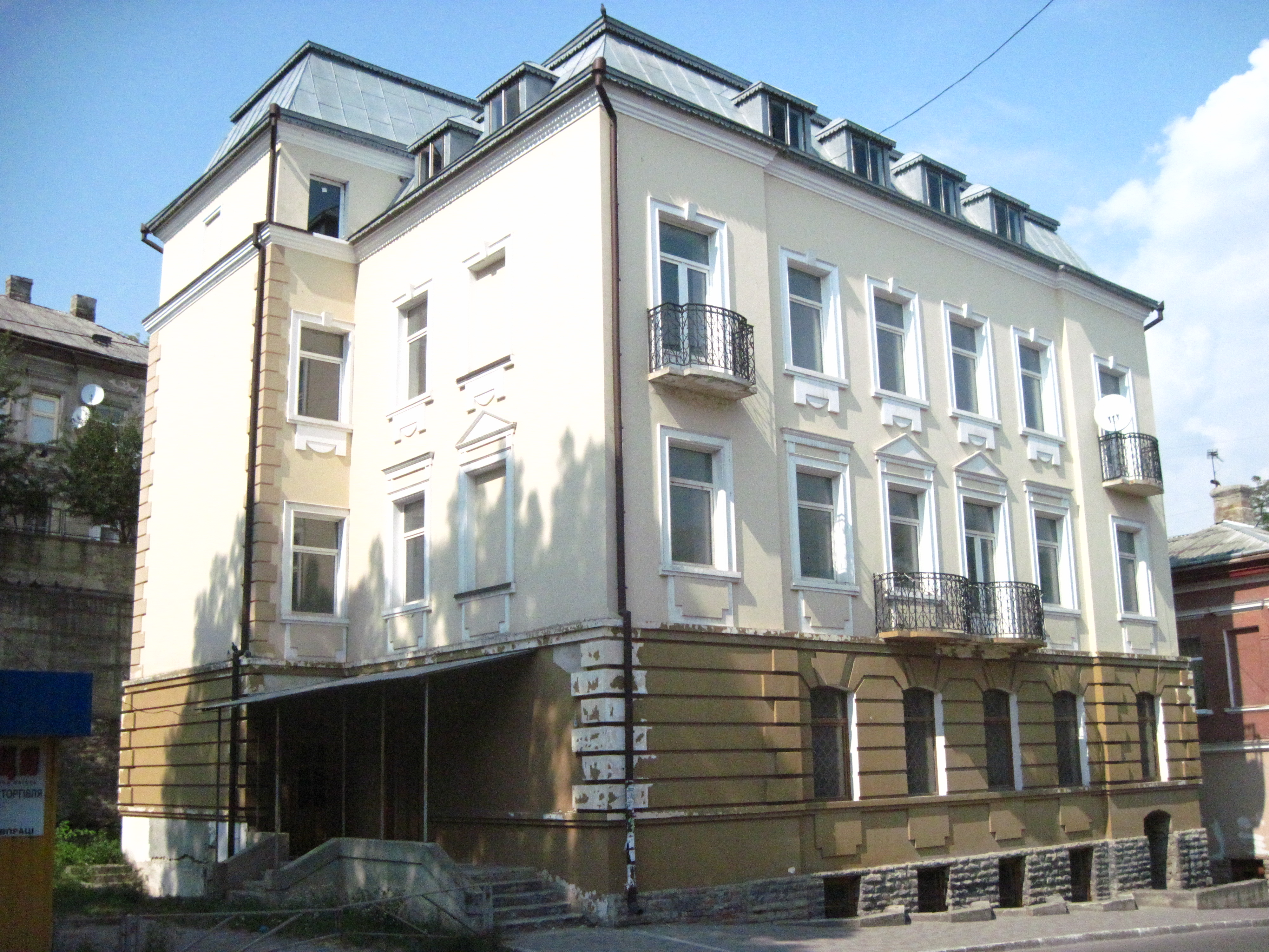 Бучач, вул. Галицька, 74. Готель (перебудований готель Андермана)